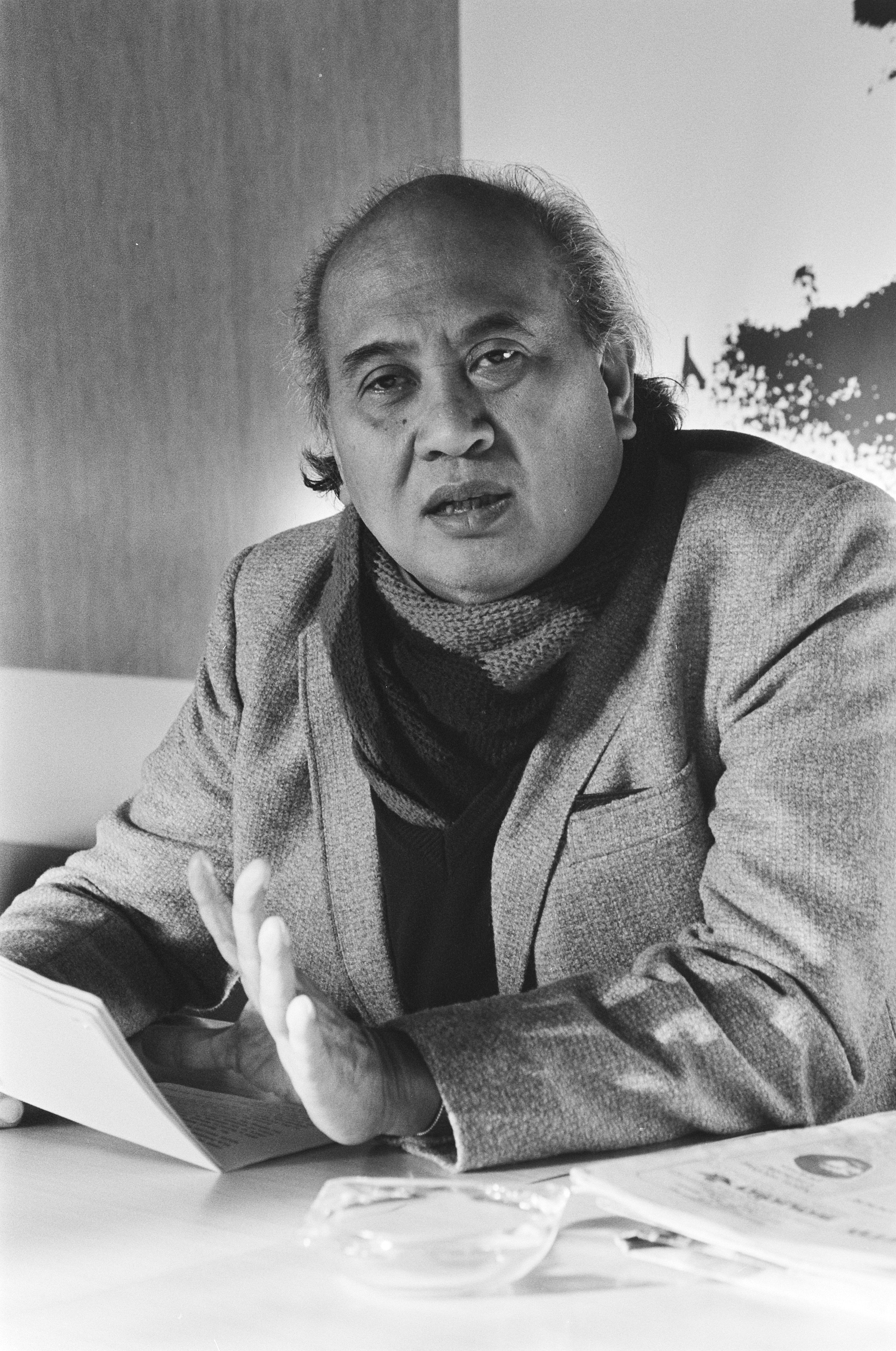 Collectie / Archief : Fotocollectie Anefo Reportage / Serie : [ onbekend ] Beschrijving : Persconferentie in Den Haag over de toestand in Turkije Mr. Ernst Utrecht , rechter voor permanente Volkstribunaal VN Romes Datum : 7 januari 1982 Locatie : Den Haag, Zuid-Holland Trefwoorden : persconferenties Persoonsnaam : ernst Fotograaf : Dijk, Hans van / Anefo Auteursrechthebbende : Nationaal Archief Materiaalsoort : Negatief (zwart/wit) Nummer archiefinventaris : bekijk toegang 2.24.01.05 Bestanddeelnummer : 931-8968